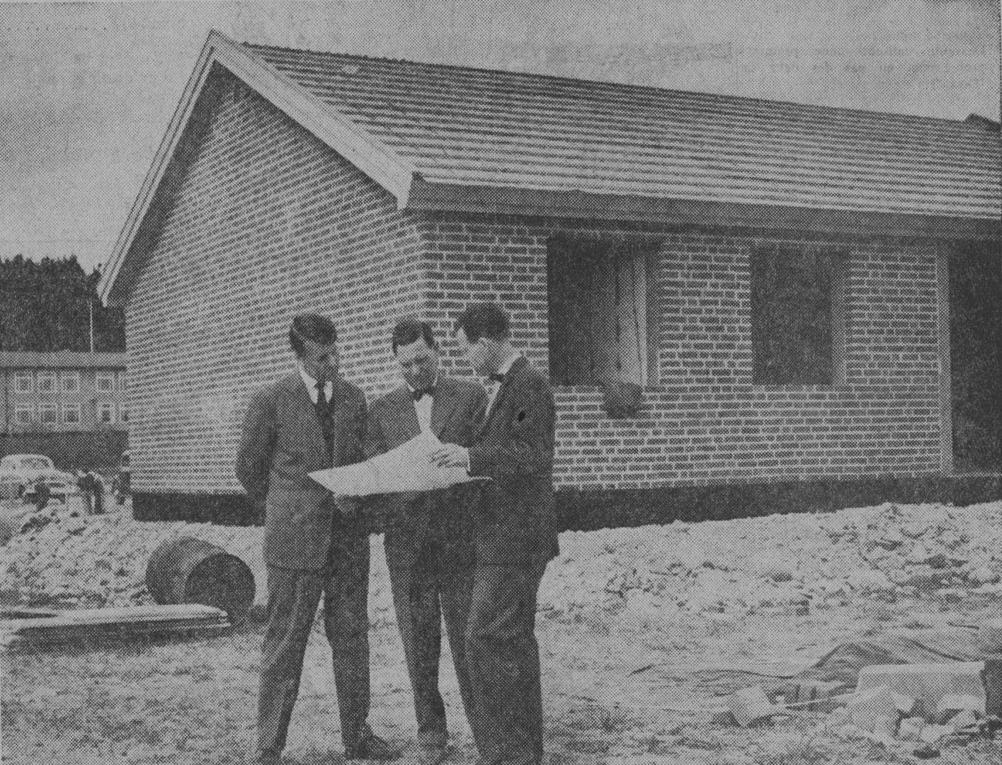 Uppförande av TV-villan, Enköping. Från vänster presidenten i Lions Club Eddie Olzén, byggmästare Ivar Bjerklås, arkitekt Lauri Lundberg